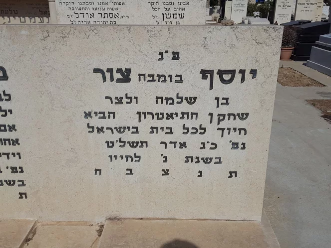 קברו של בומבה צור בבית העלמין הישן בהרצליה צילום אלי אלון